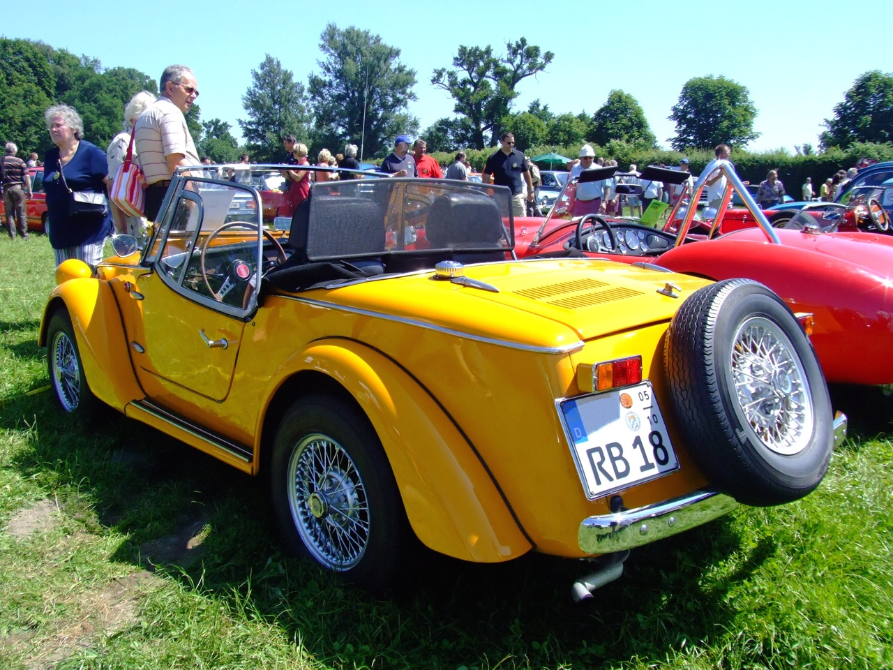 Siata (Fiat) Spring Spider 850ccm 34 PS 4 Zylinder 120 km/h Baujahr: 1968 Quelle: selbst fotografiert, 06/2007 Fotograf: Späth Chr.